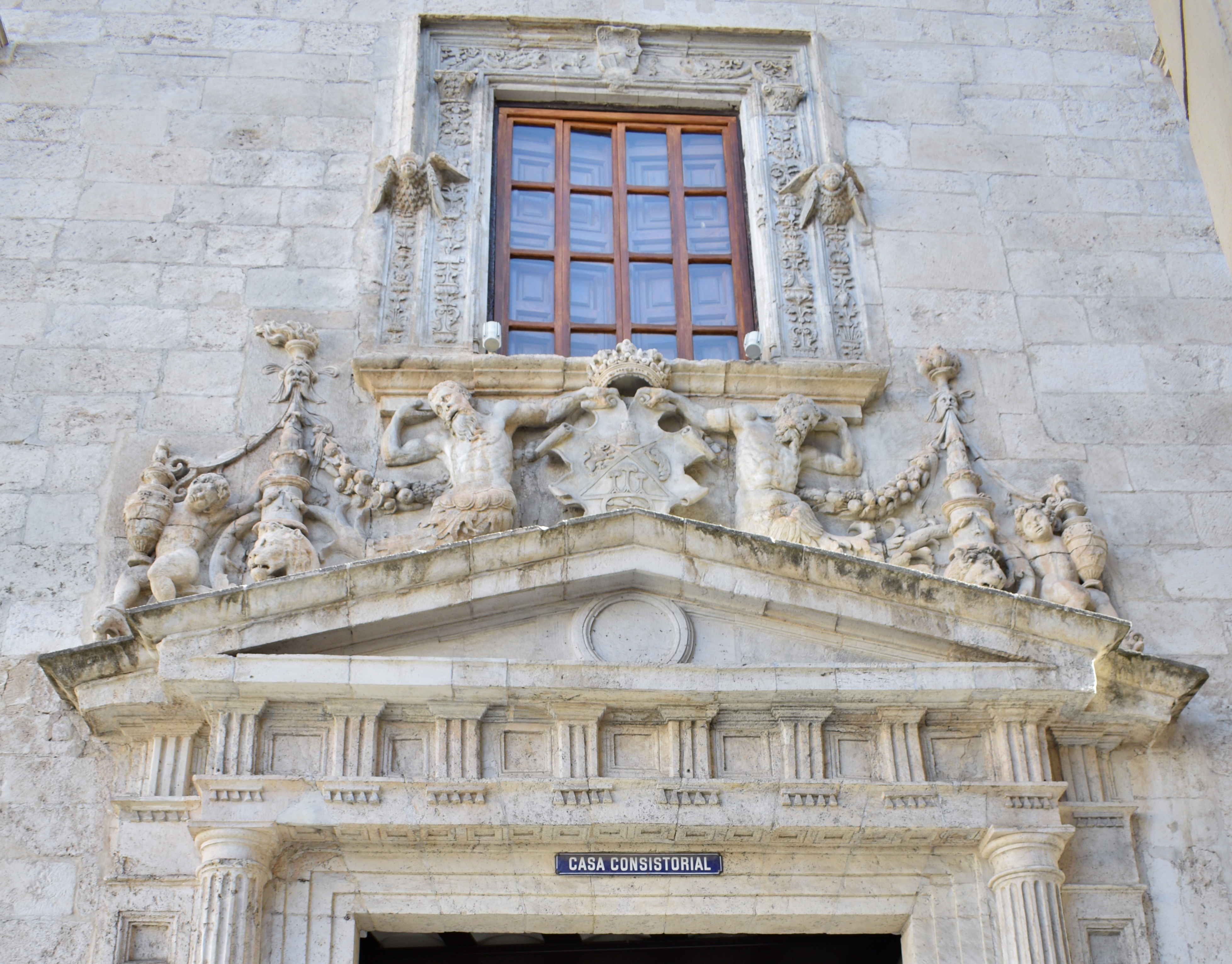 Villena.